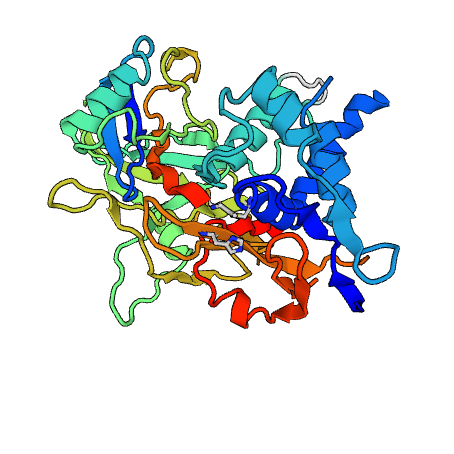 Imatge 3D estructura terciària proteïna USP30